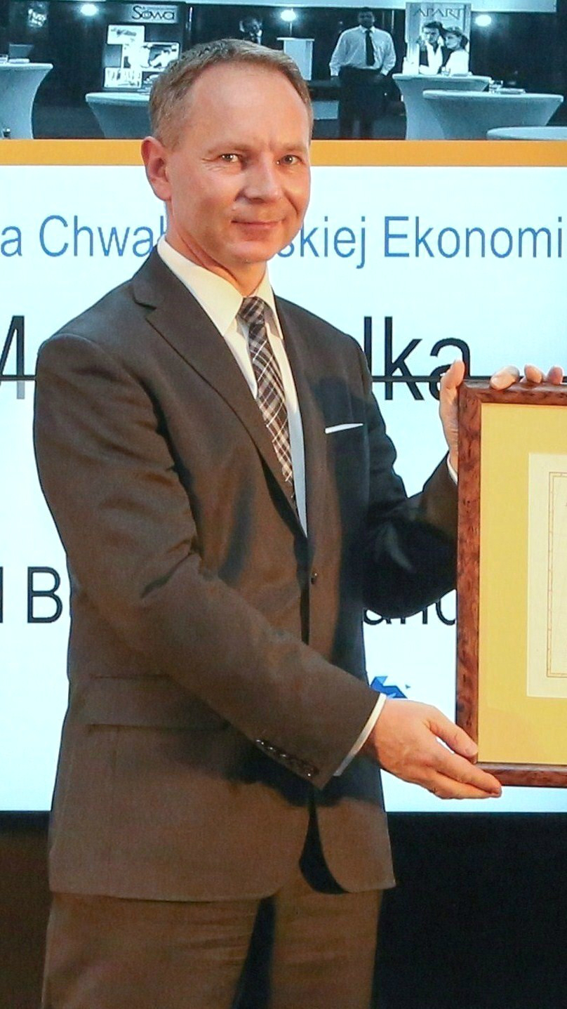 Adam Maciejewski, ekonomista (prezes GPW).